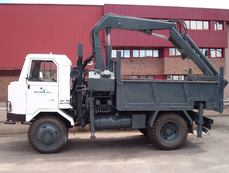 IPV maderera